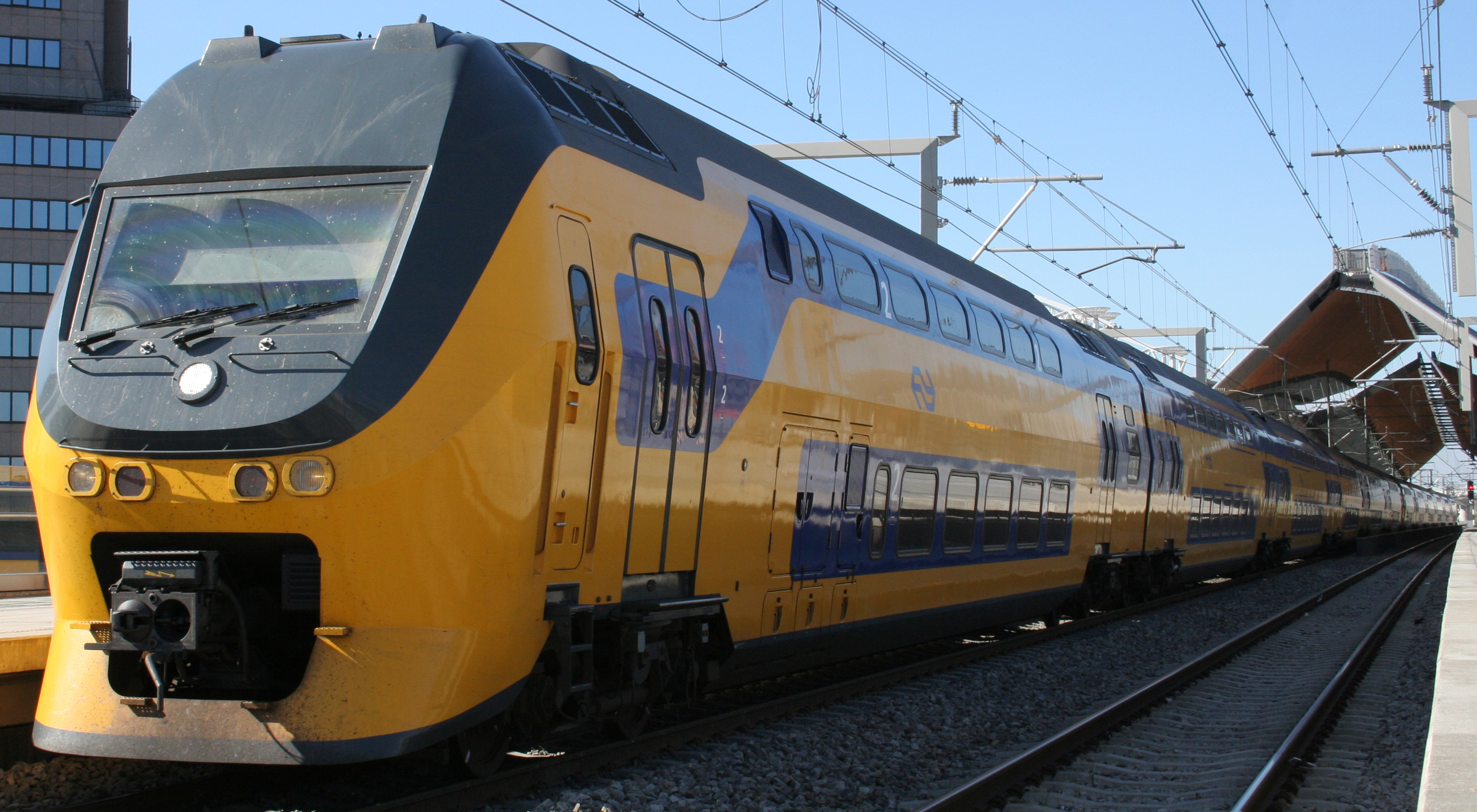 Foto van twee VIRM VI stellen te Amsterdam Bijlmer ArenA.